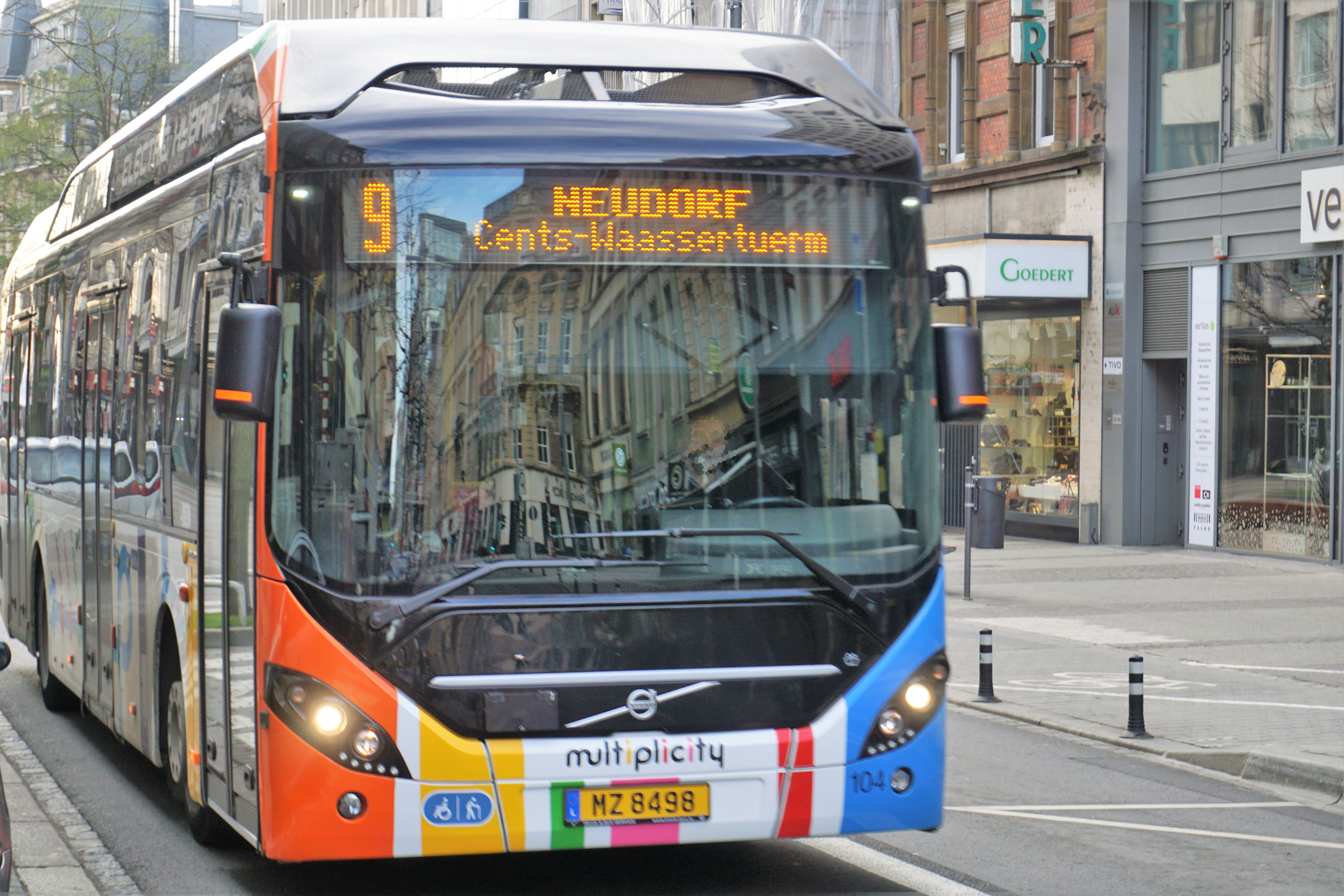 Luxembourg, bus AVL 104 (#MZ8498) sur une ligne 9 dans l'avenue de la Gare en direction de Neudorf.